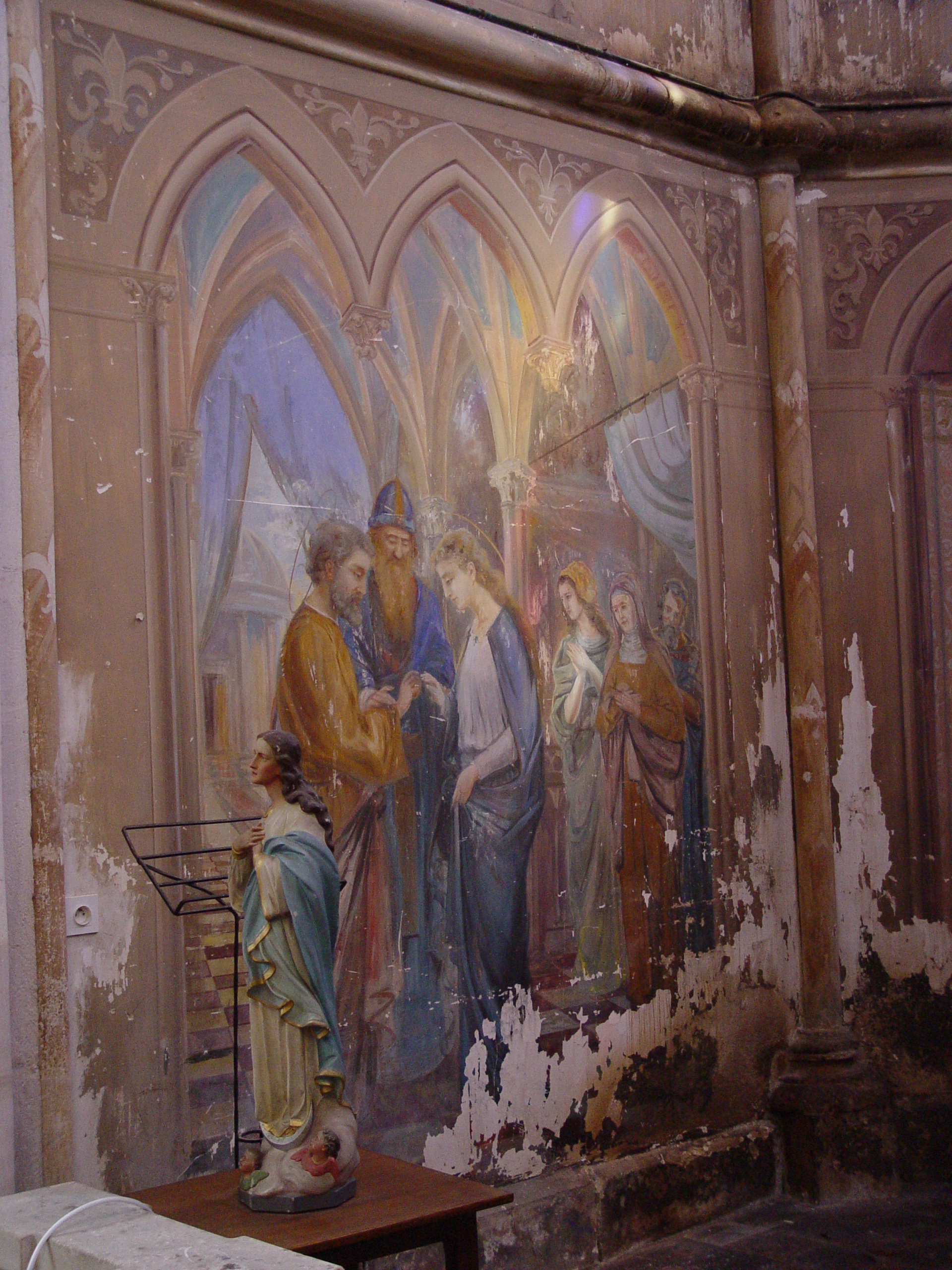 Lacroix-sur-Meuse, fresques de l'église. Auteurs : famille Donzelli, vers 1920